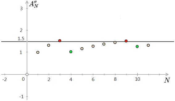 黎曼重排定理：交错调和级数重排收敛于1.5的算法